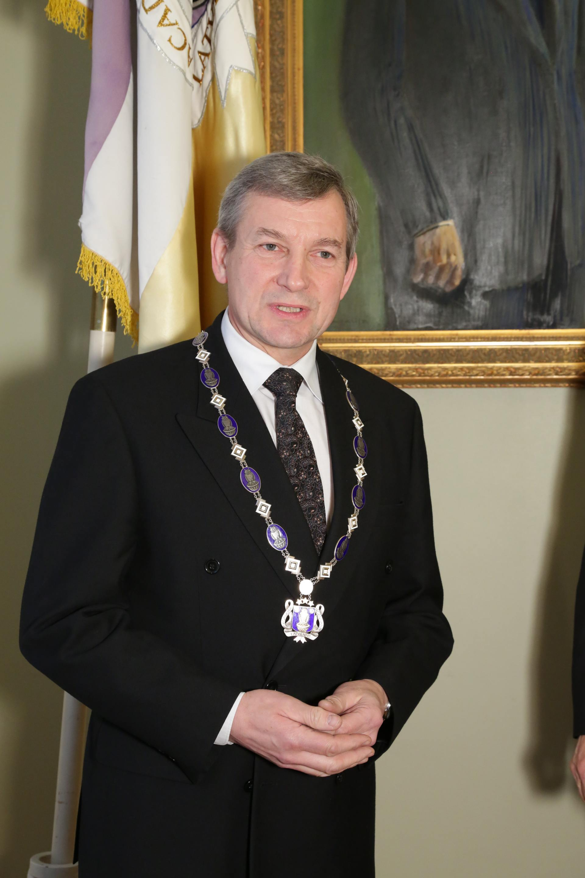 O. Sparitis mit Amtskette